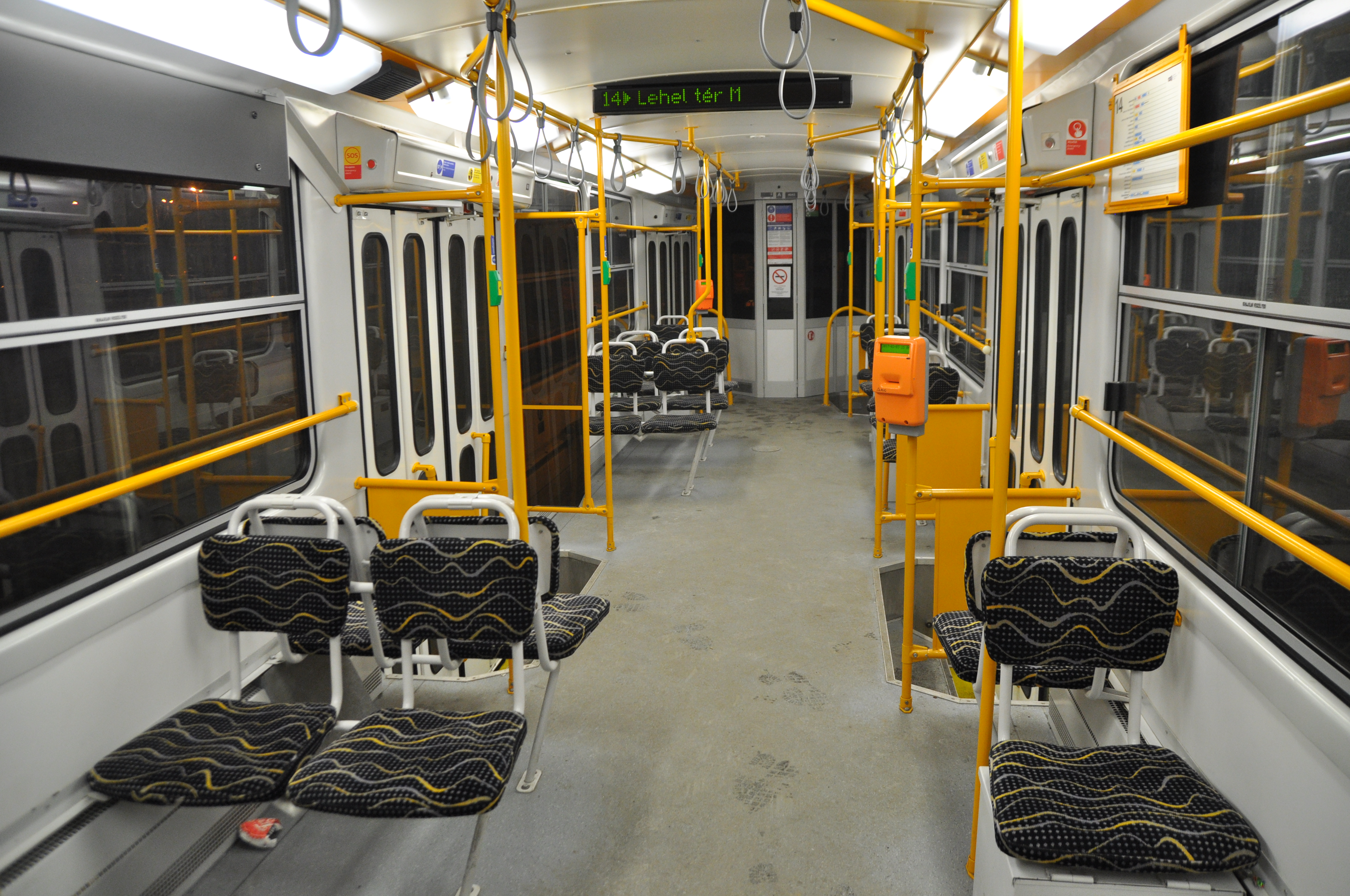 Budapest, Tatra T5C5 villamos